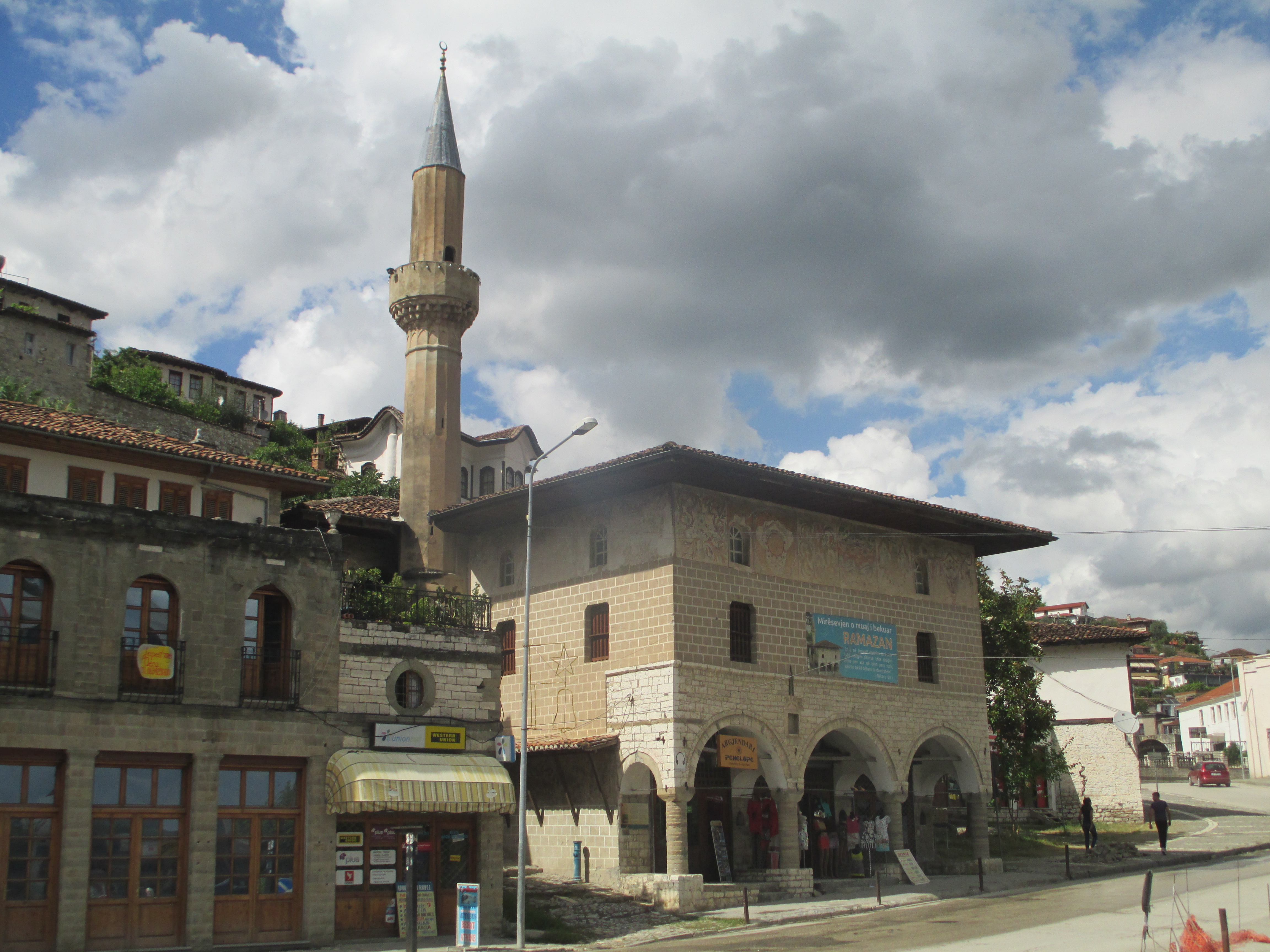 מסגד בבראט